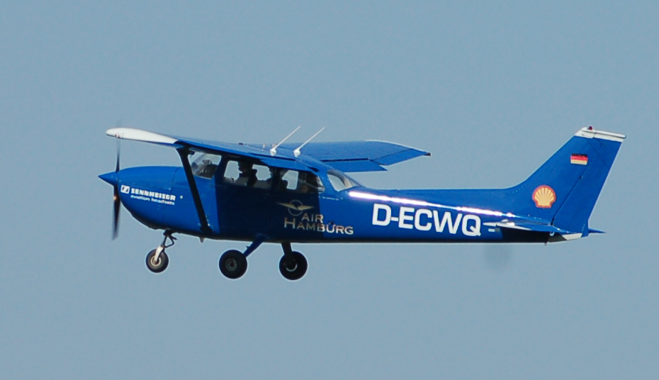 Cessna 172 Skyhawk(D-ECWQ) über dem Flugplatz Uetersen.